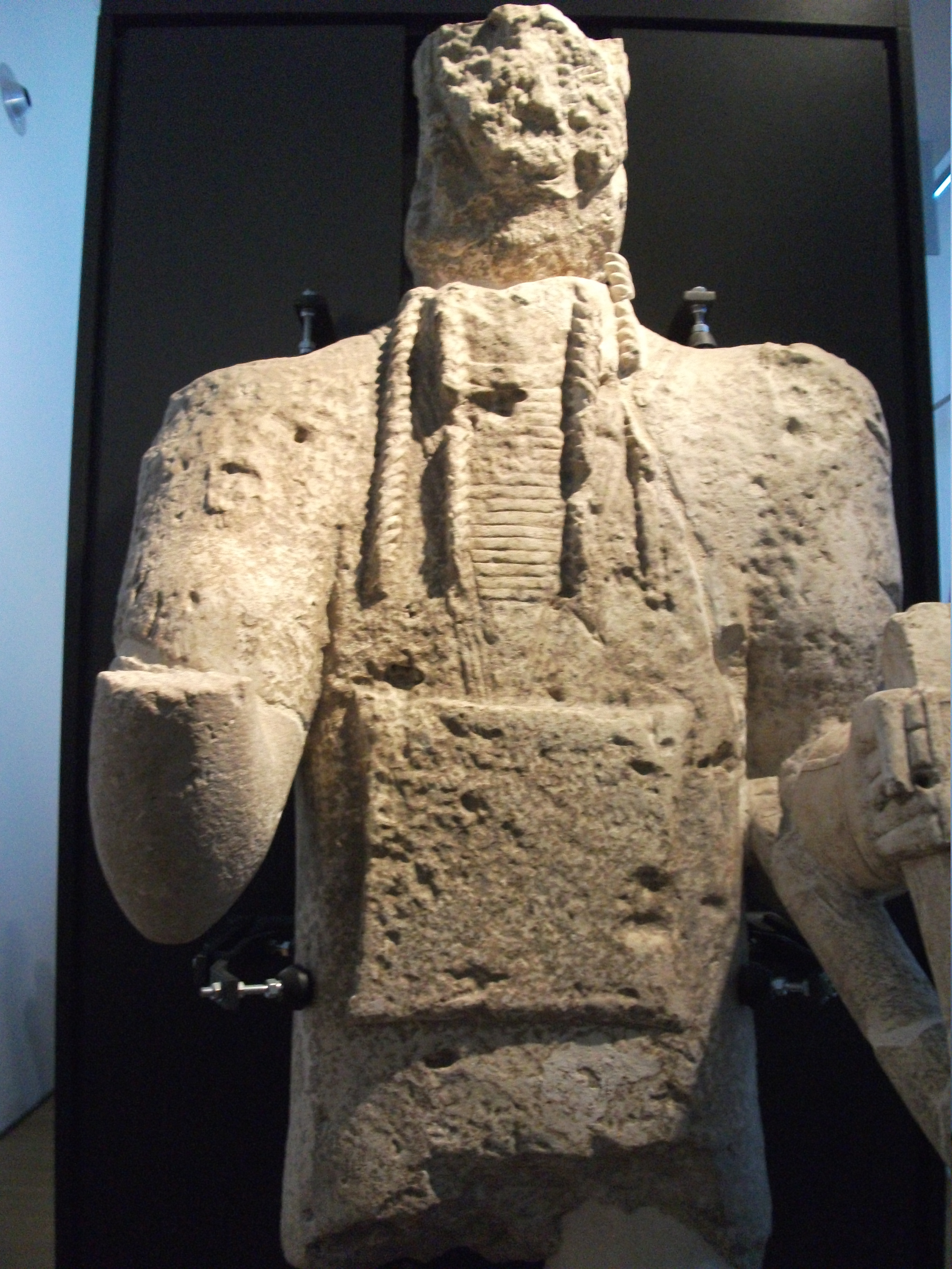 Scultura, Gigante Monte Prama, arciere, Sardegna, Italia civiltà nuragica, preistoria, archeologia, età del bronzoUnknown sculpture, giant of monte, archer, sinis, sardinia, italy, nuragic civilization,archaeology, bronze age